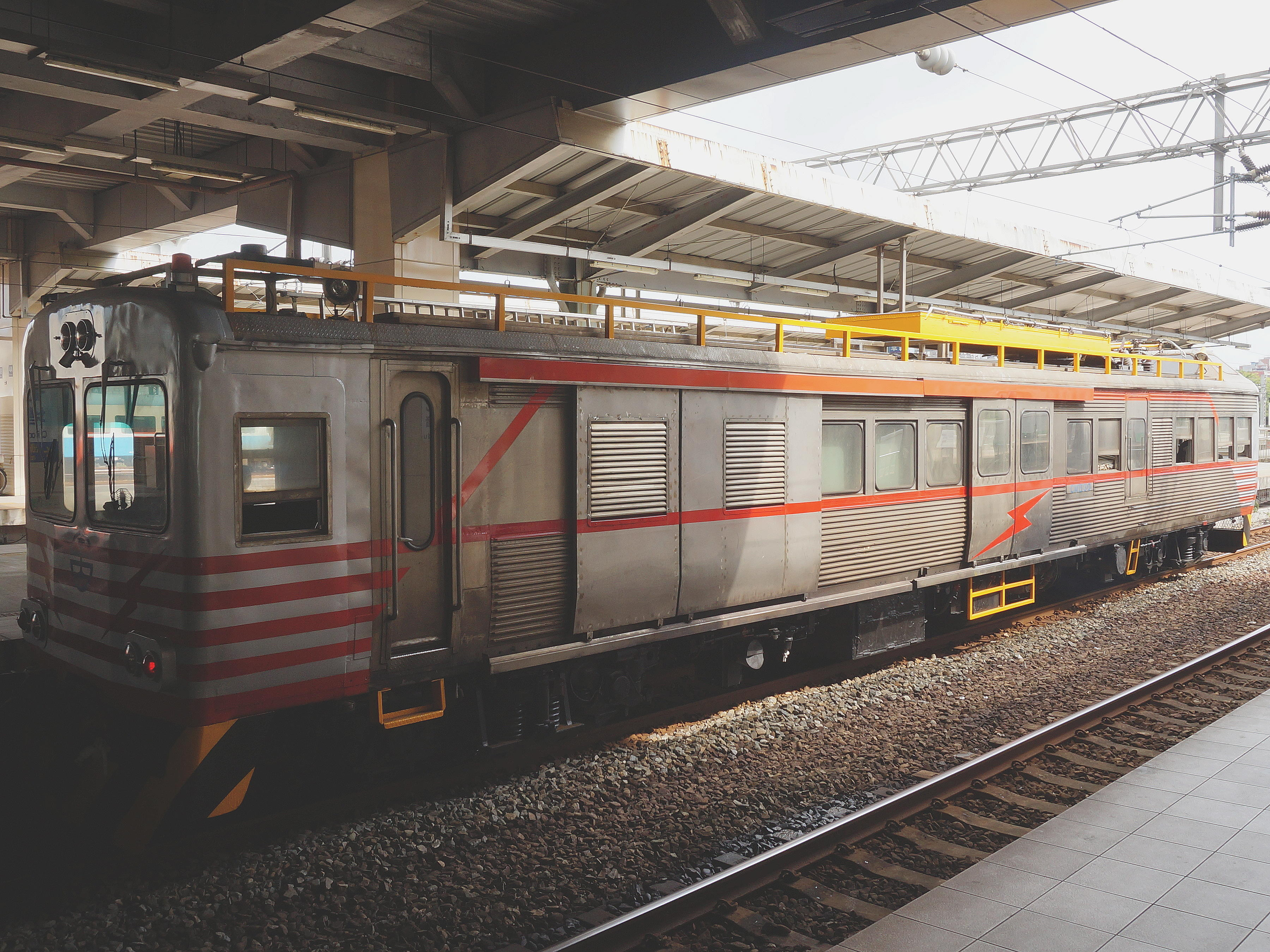 中文（台灣）: 臺灣鐵路管理局電車線維修車CMB30，以臺灣鐵路管理局柴油客車DR2719改造而成，停靠七堵車站第二月台A側。